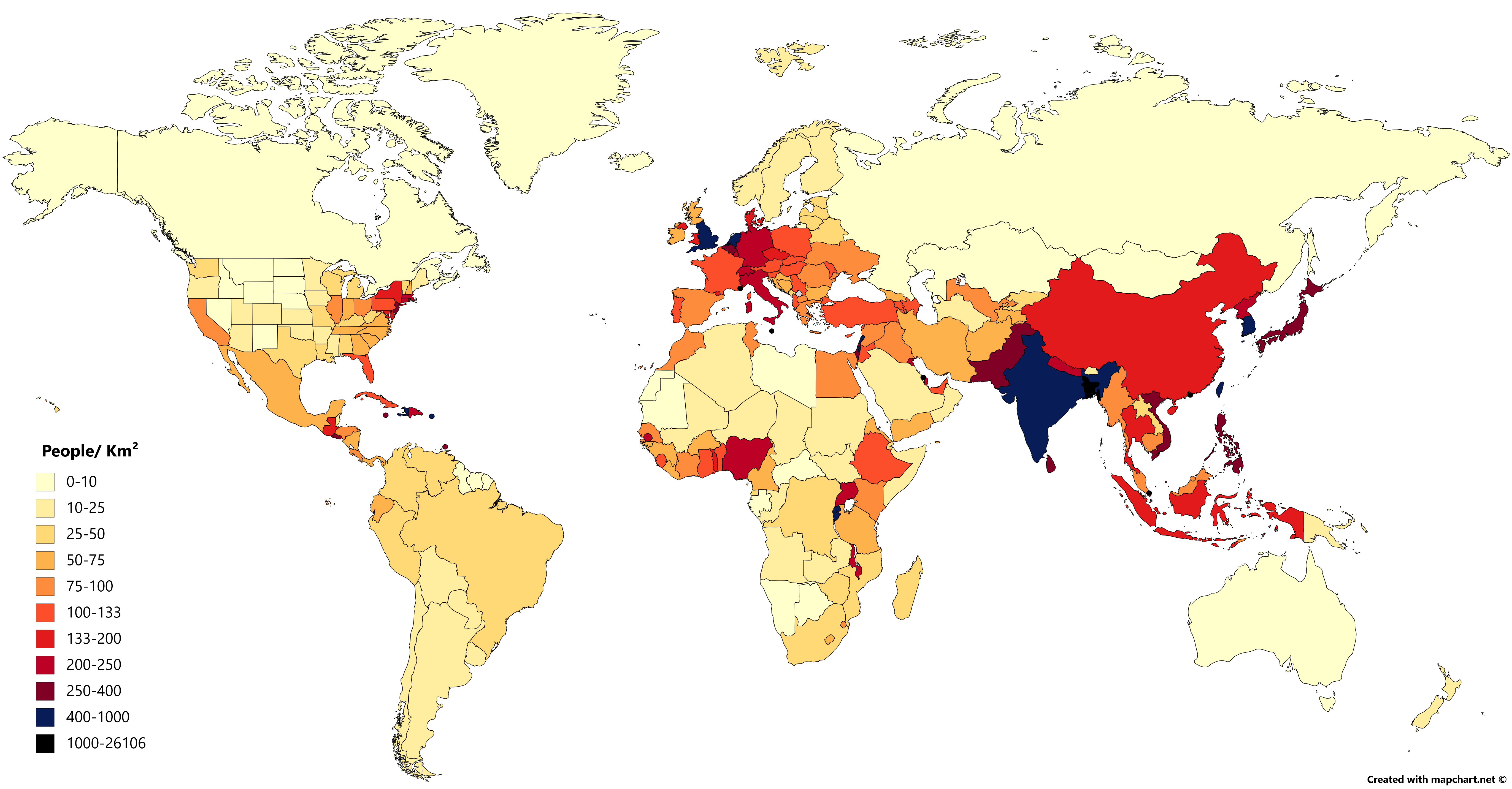 People's /Km² for all countries (and us states, uk kingdoms)